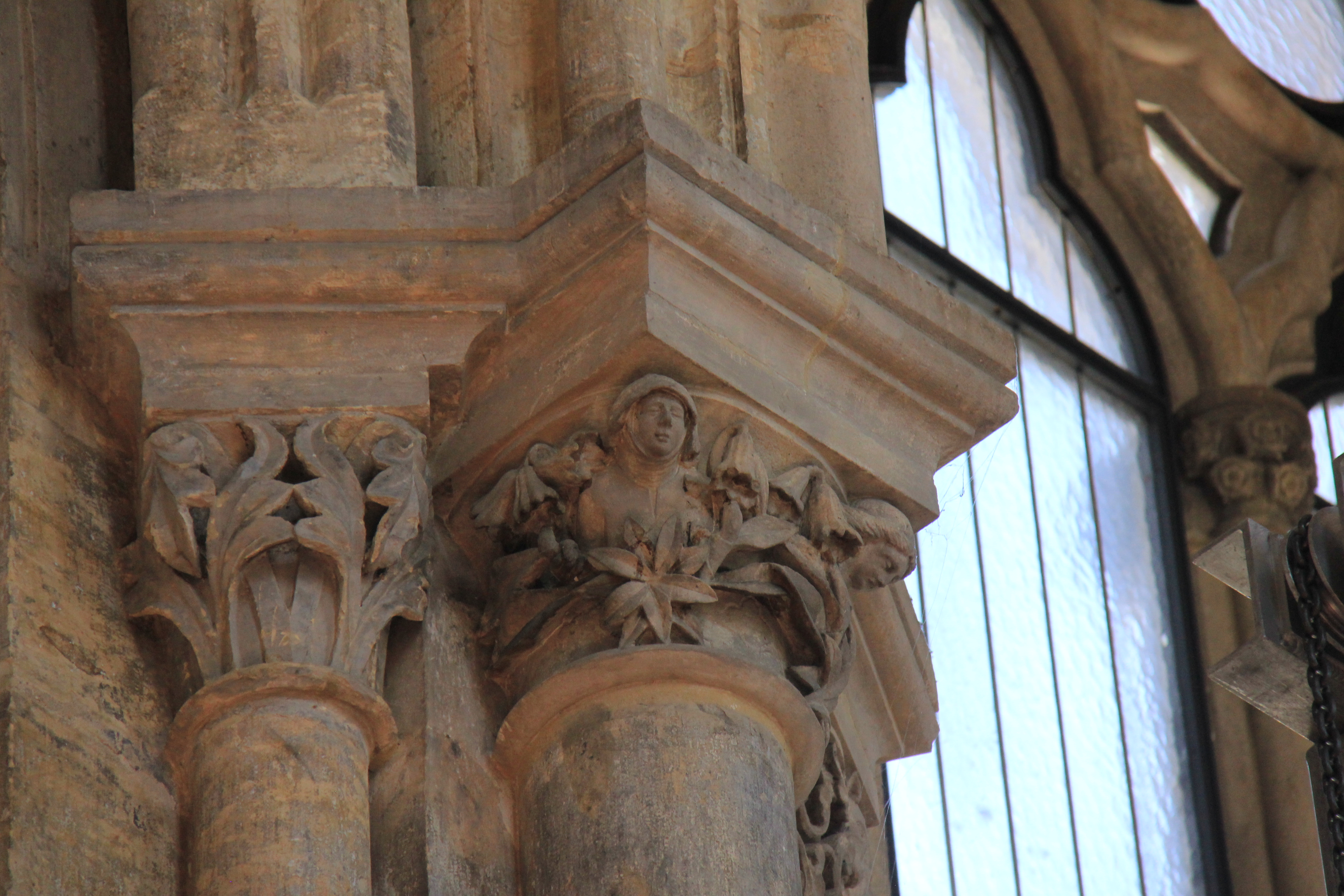 Лик Анежки на капители колоны